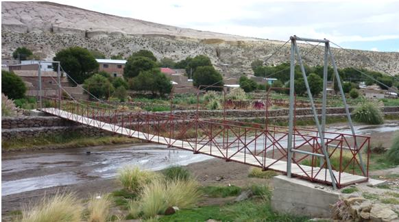 Vista de la localidad de San Agustín, en la provincia Enrique Baldivieso, Departamento de Potosí